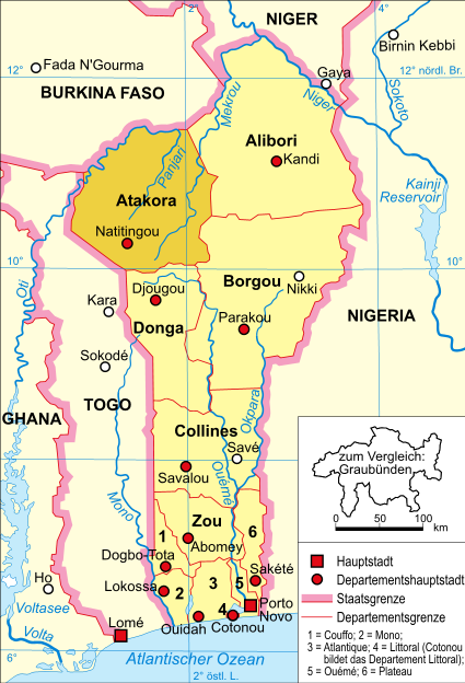 politische Karte Benins (Departement Atakora hervorgehoben)